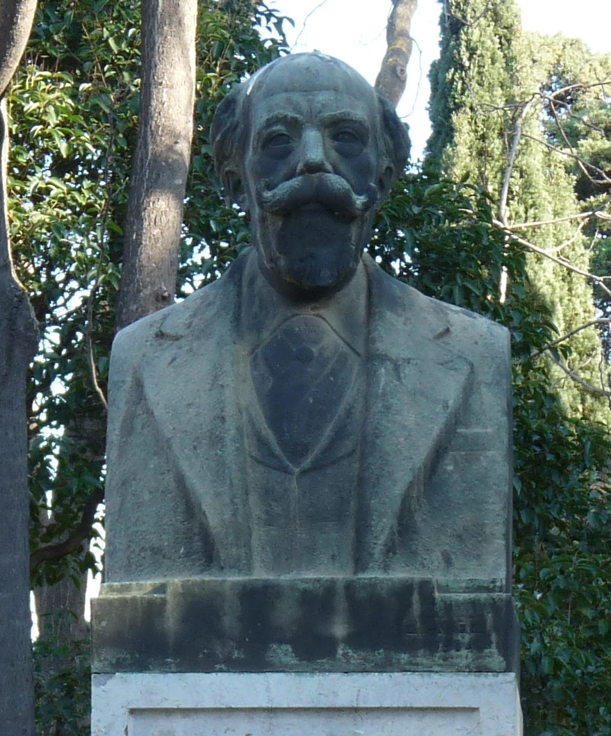 Zaragoza - Monumento a Eusebio Blasco en el Parque Grande; realizada por Enrique Anel en 1928